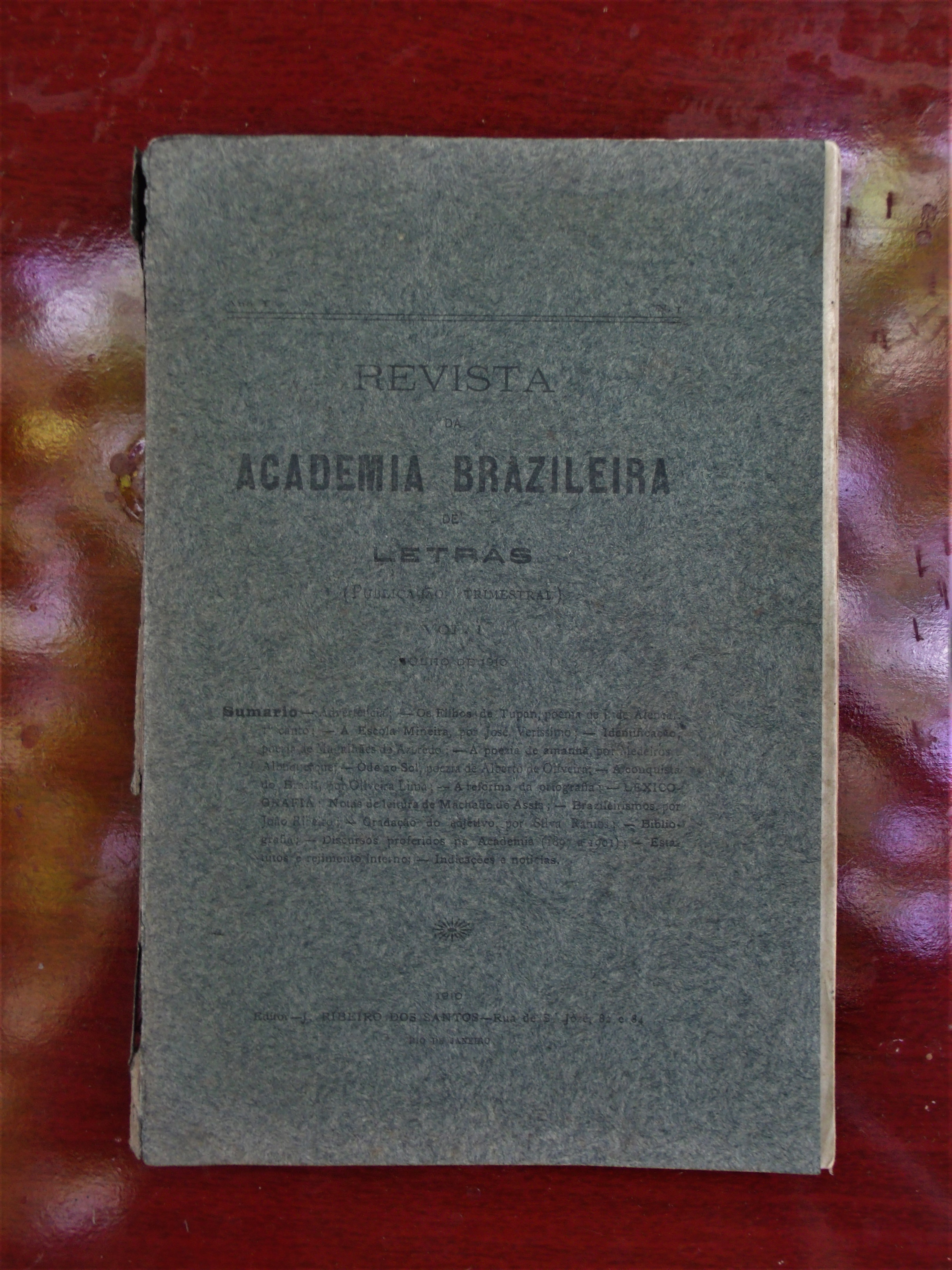 Capa original da edição número 1 da Revista da Academia Brasileira de Letras, em 1910.